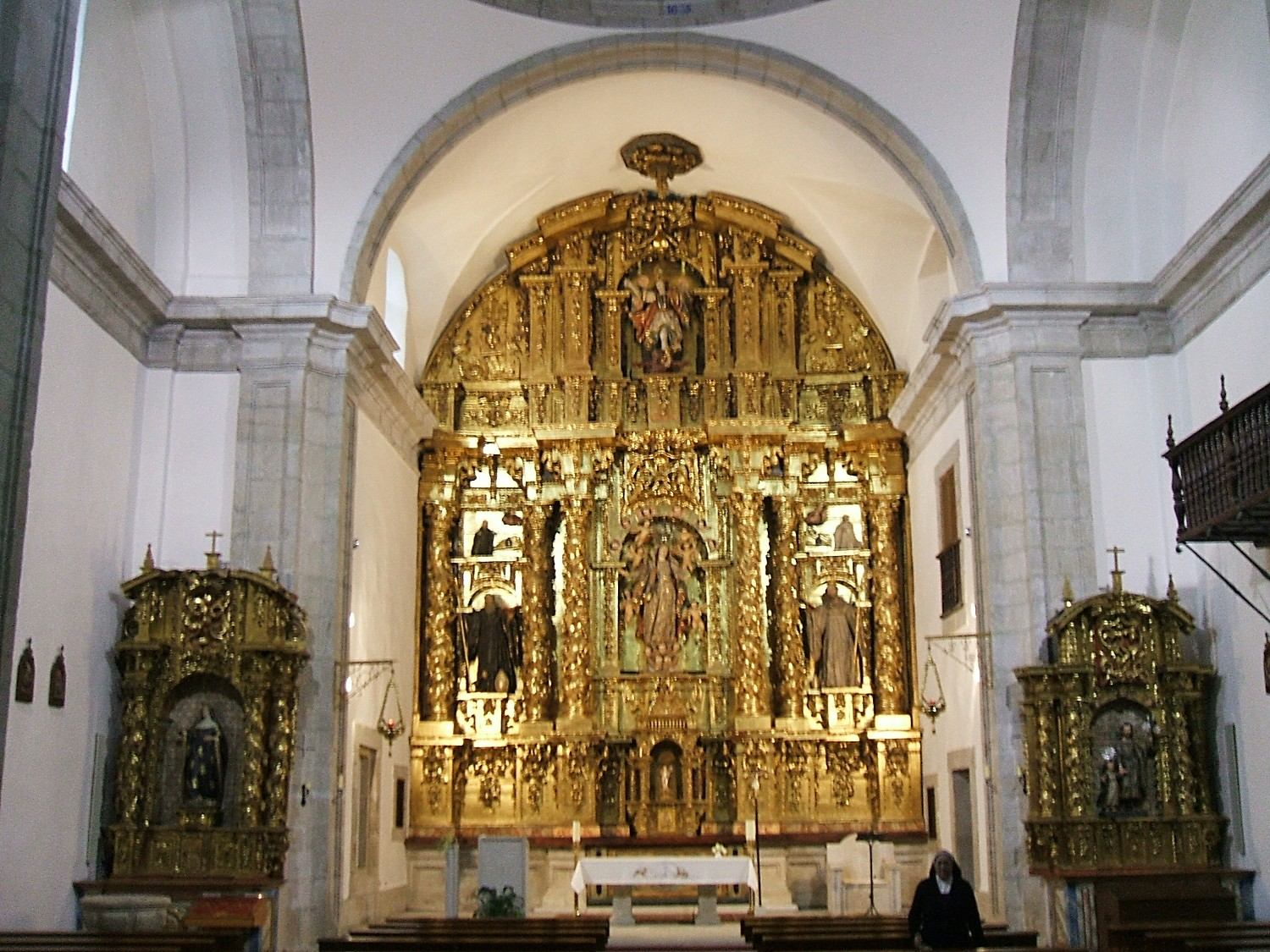 Cabecera de la iglesia del Monasterio de MM Cistercienses de San Miguel de las Dueñas, provincia de León, España